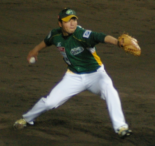 香川オリーブガイナーズ 冨田康祐 横浜ベイスターズ2011年育成選手ドラフト１位指名